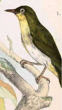 Zosterops nehrkorni auf einer Tafel aus dem Kapitel "Die Vögel von Gross-Sanghir, nebst einem Anhange über die Vögel von Siao" in der Zeitschrift Ornis, Jahrgang 4, 1888 (Hrsg. Rudolf Blasius (1842-1907)